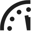 Часы Судного Дня